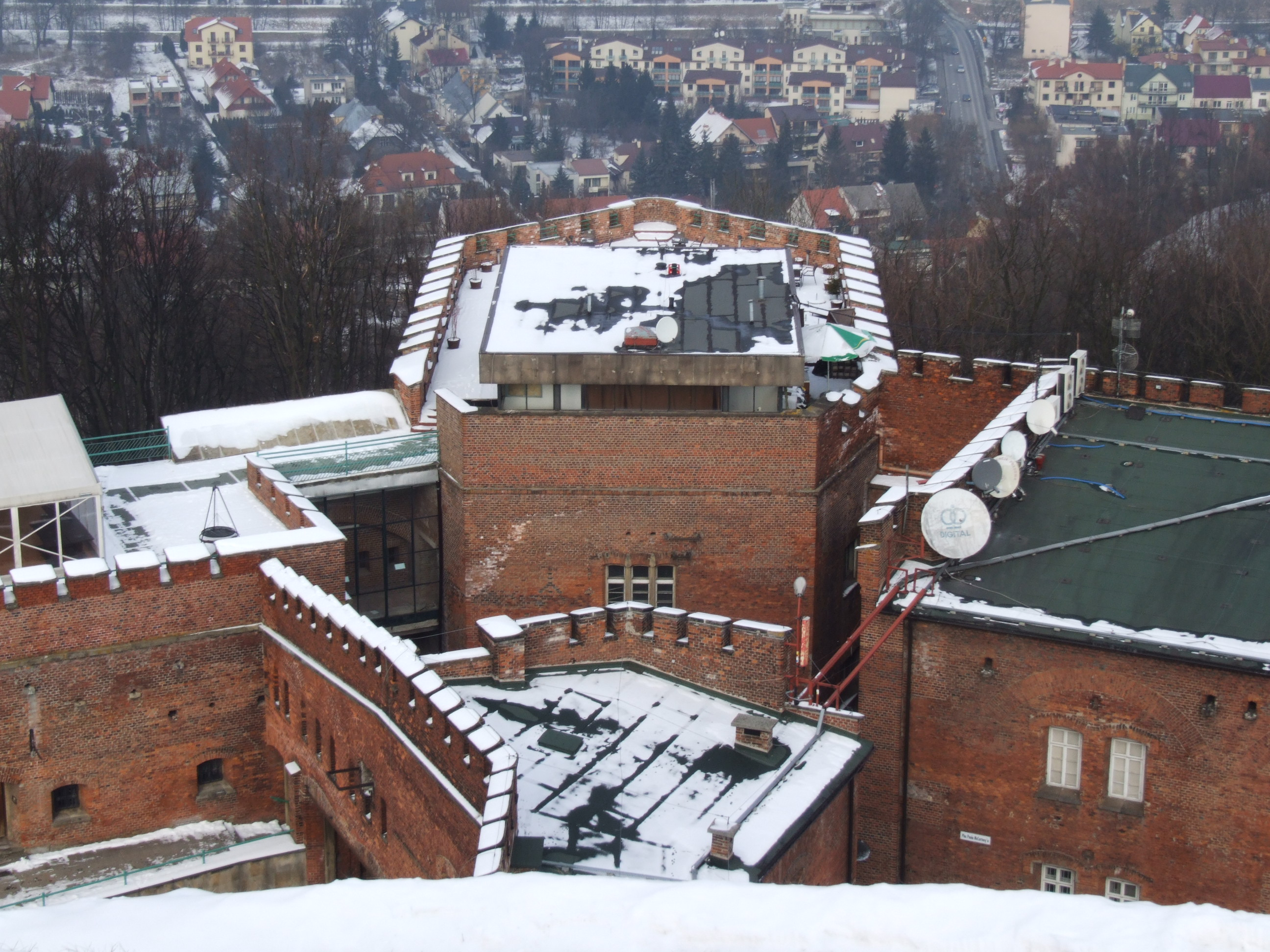 Festung Krakau - Fort 2 Kosciuszko